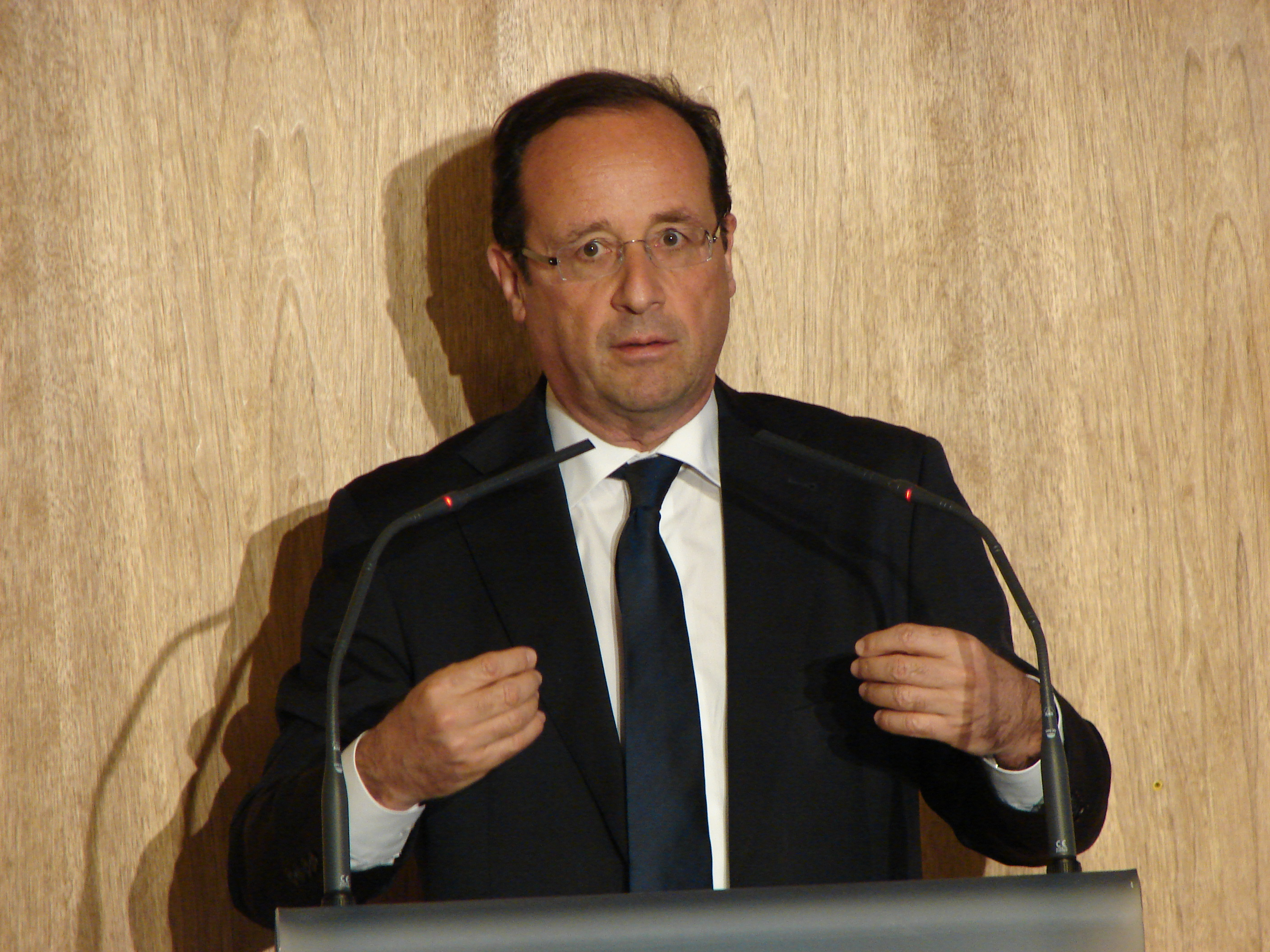 François Hollande au siège de la CGPME